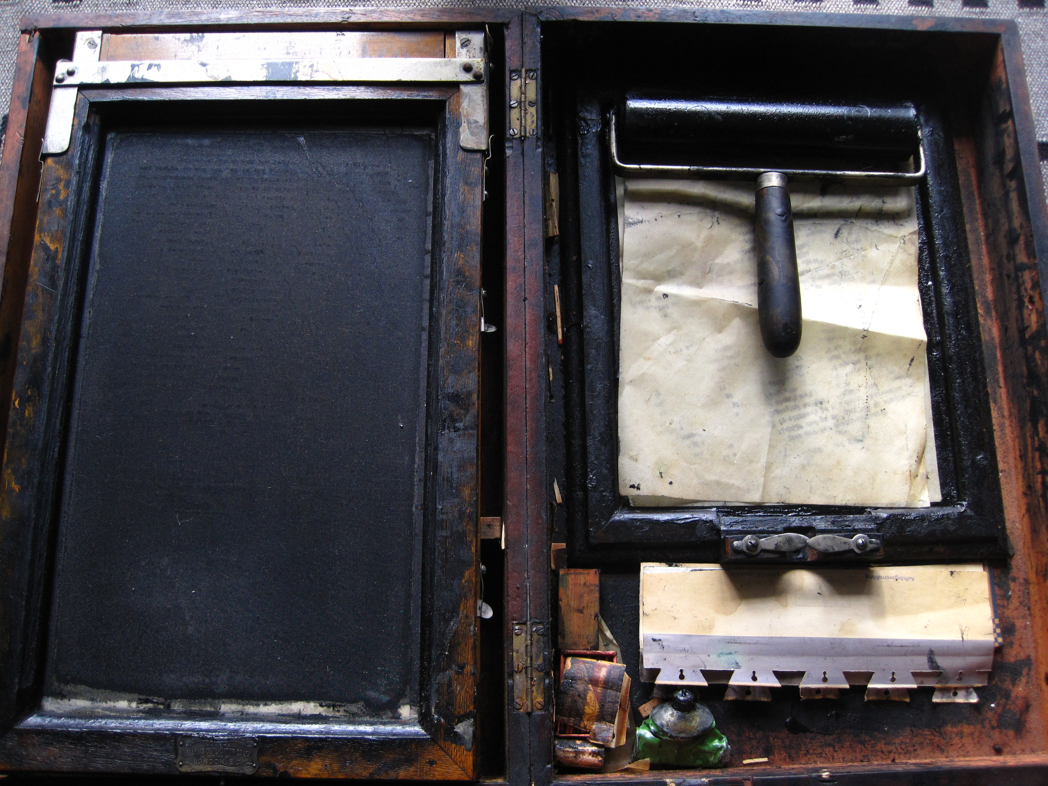 Forløparan til stensilmaskina. Denne står i Amtsstova i Leikanger kommune og tilhøyrde Amtsskolestyret Nordre Bergenhus Amt tidleg på 1900-talet.